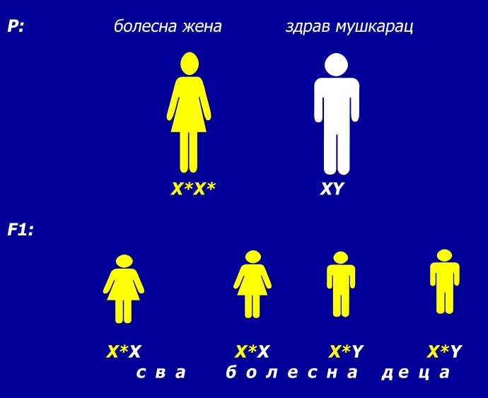 аутор: Снежана Трифуновић